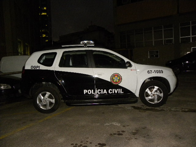 Rio de Janeiro police car - Brazil